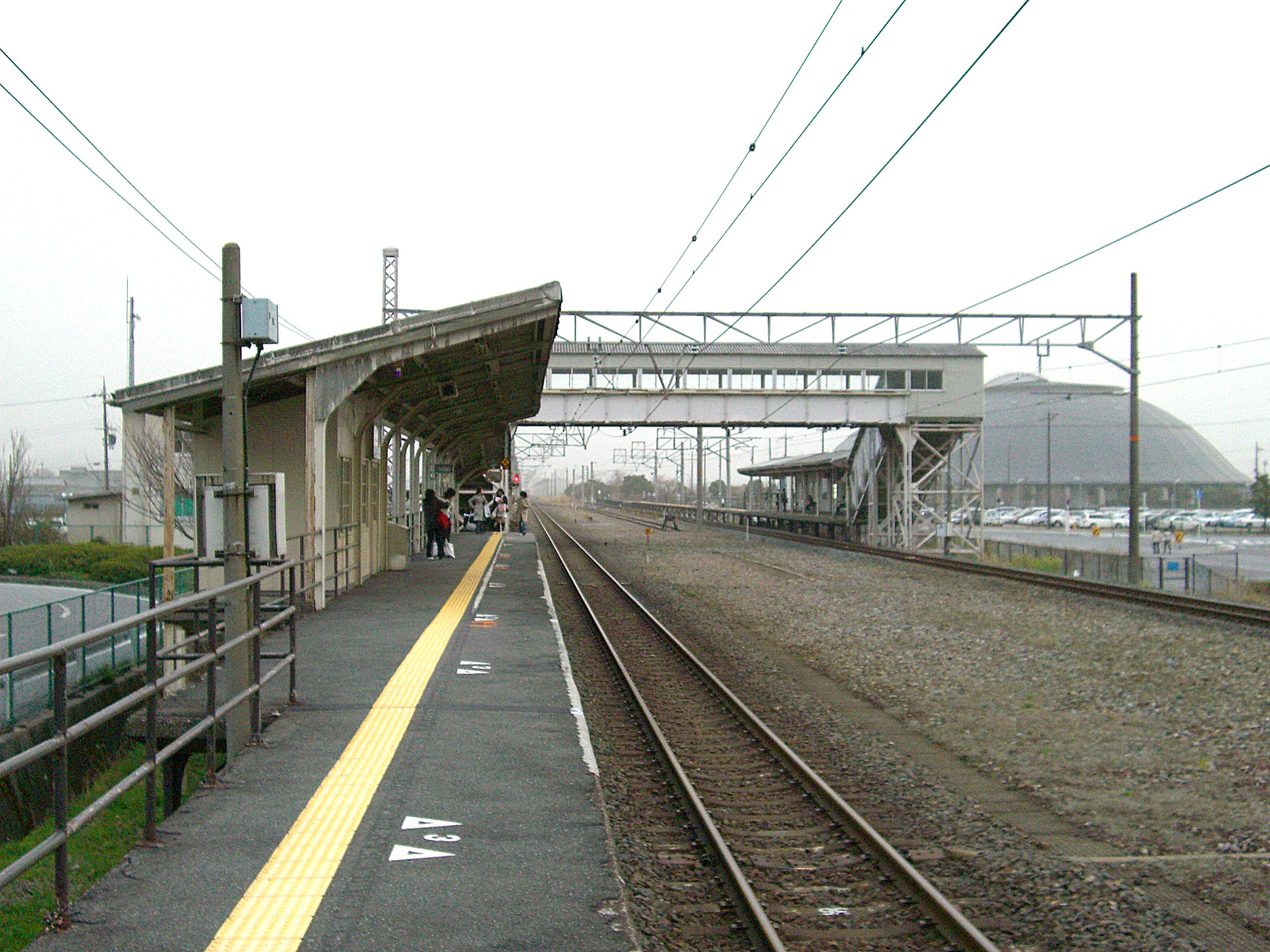 West Japan Railway Hokuriku Main Line（Biwako Line） Tamura Station Platform 西日本旅客鉄道 北陸本線（琵琶湖線） 田村駅 駅ホーム